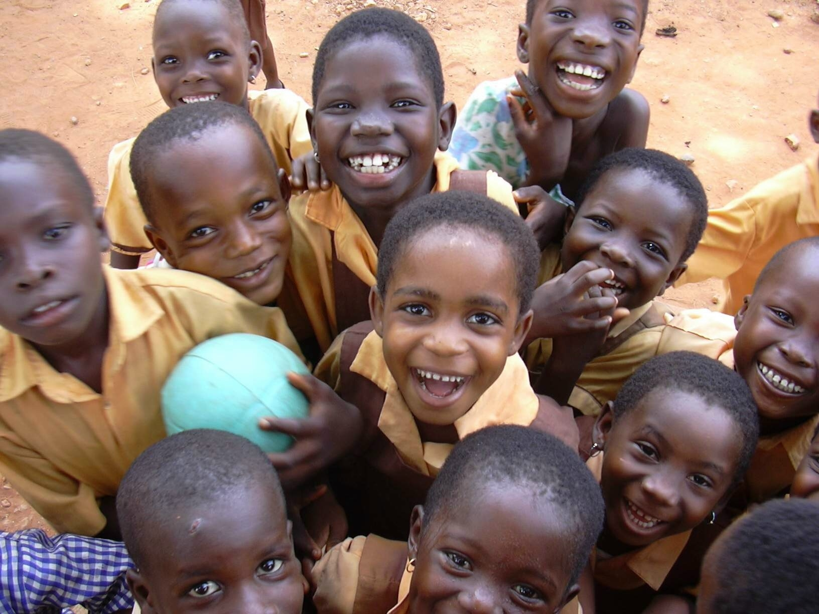 Schulkinder vor einer Grundschule in Ghana, die von der EPC betrieben und von der Norddeutschen Mission unterstützt wird.